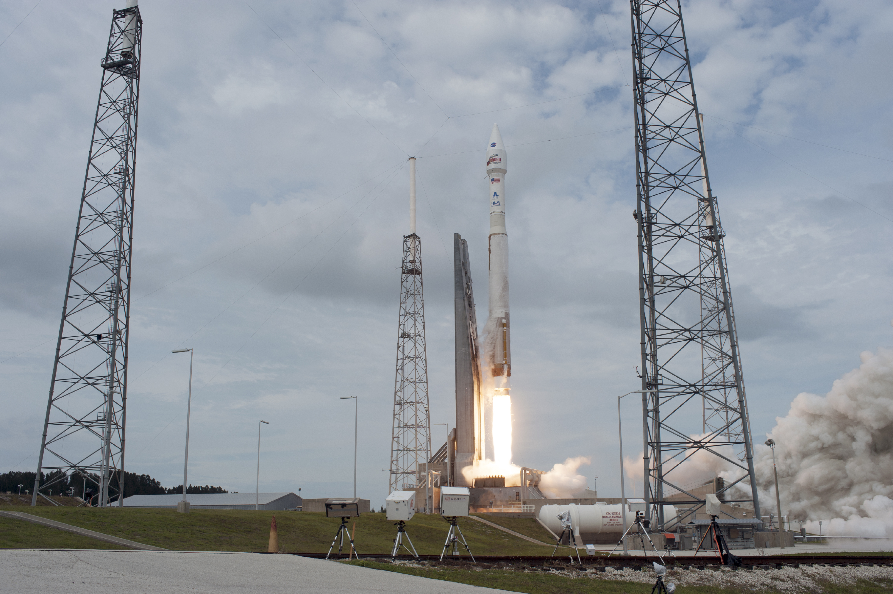 Lancement de la sonde spatiale martienne MAVEN